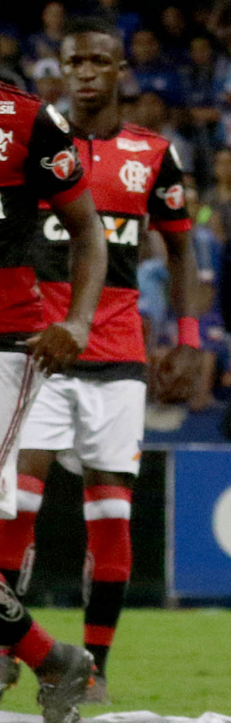 Guayaquil, miércoles 14 de marzo del 2018 (Andes).-En el estadio Capwell en Guayaquil, Emelec enfrenta a Flamengo de Brasil en la segunda fecha del grupo D de la Copa Libertadores. Foto:Andes/César Muñoz